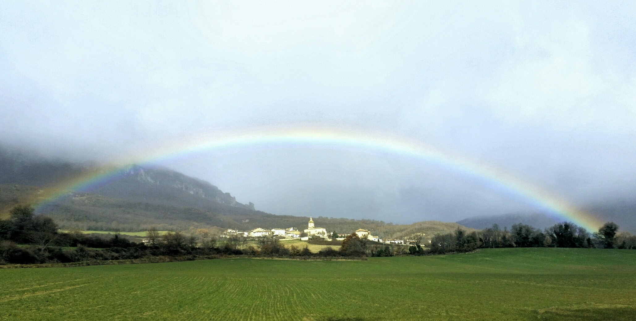 Arcoiris en Galdeano, Sierra de Lokiz This is a photography of a Special Area of Conservation in Spain with the ID: ES2200022. Natura2000 entry, EEA entry